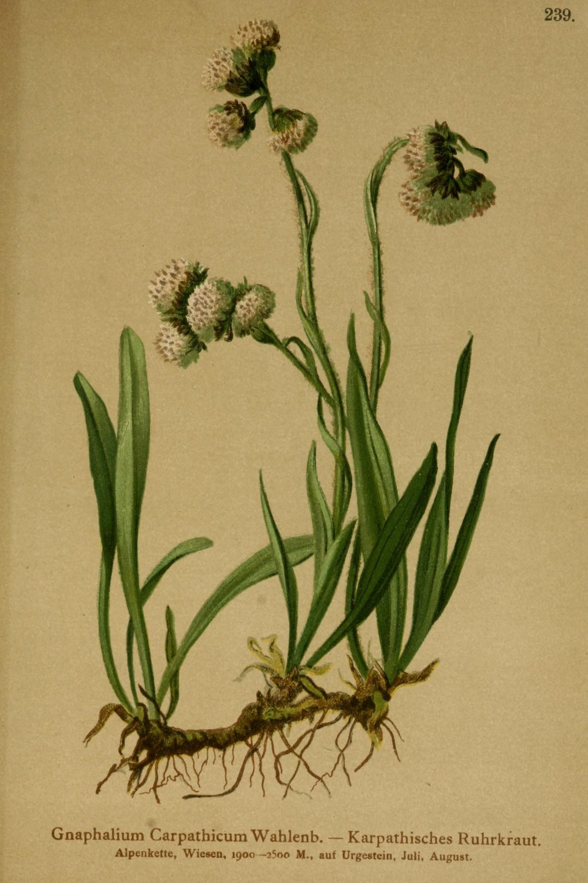 239. Gnaphalium Carpathicum Wahlenb. — Karpathisches Ruhrkraut. Alpenkette, Wiesen, 1900-2500 M., auf Urgestein, Juli. August.